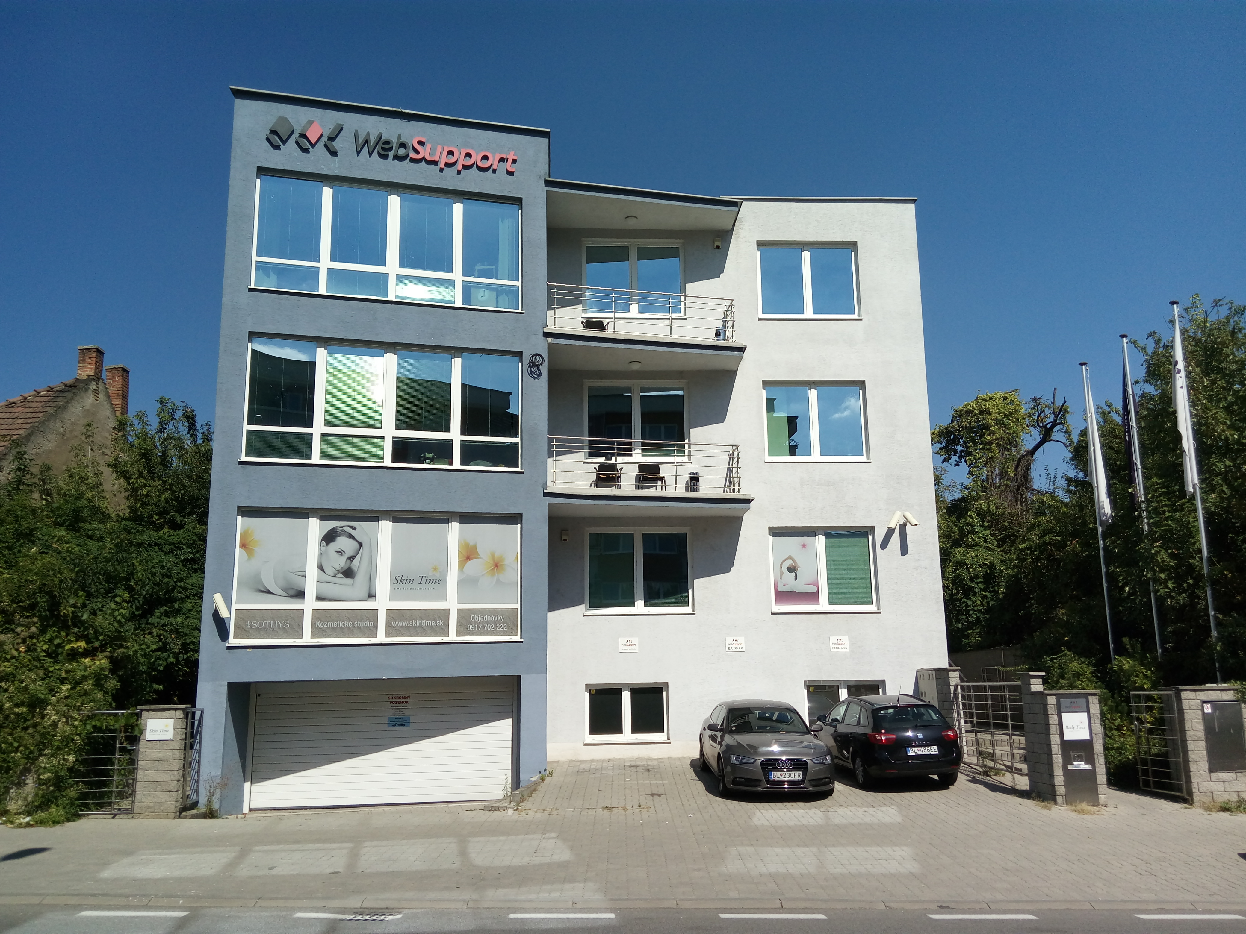 Staré grunty 12, Karlova Ves, Bratislava